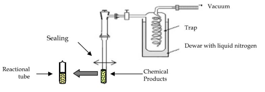 synthes of chalcogedide glass in vacuum ampule